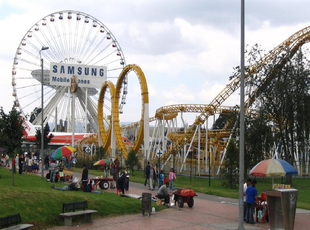 Atracciones mecánicas del Parque El Salitre de Bogotá